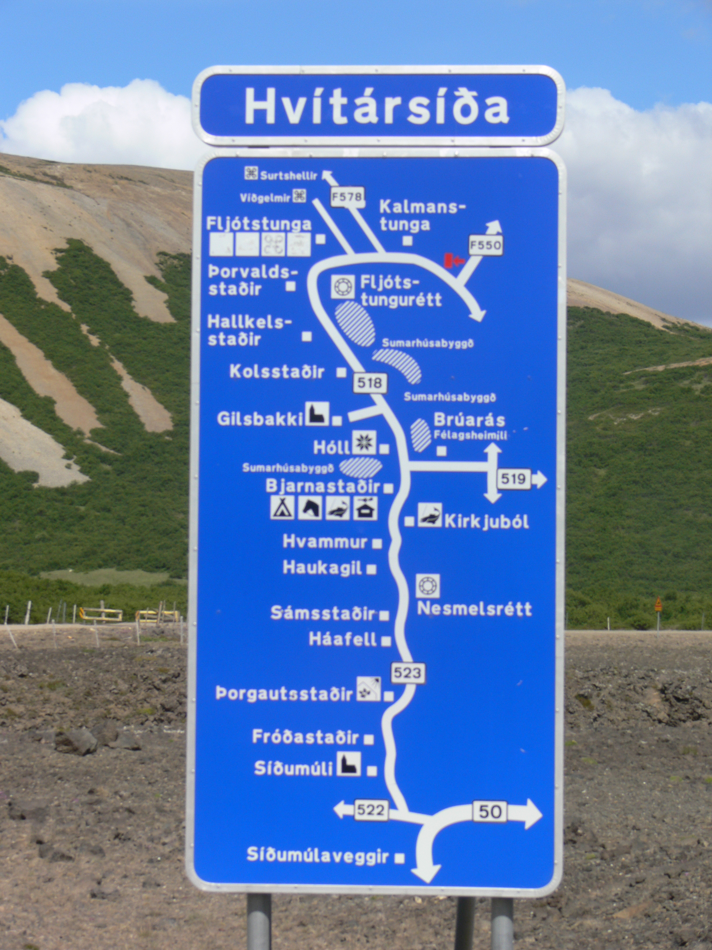 Hinweistafel für die Straßen 518 und 523 entlang der Hvítá.